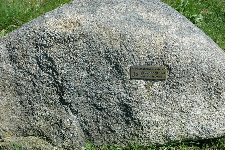 Brockengranit (Exemplar vom gesteinskundlichen Lehrpfad bei Sankt Andreasberg - Harz)